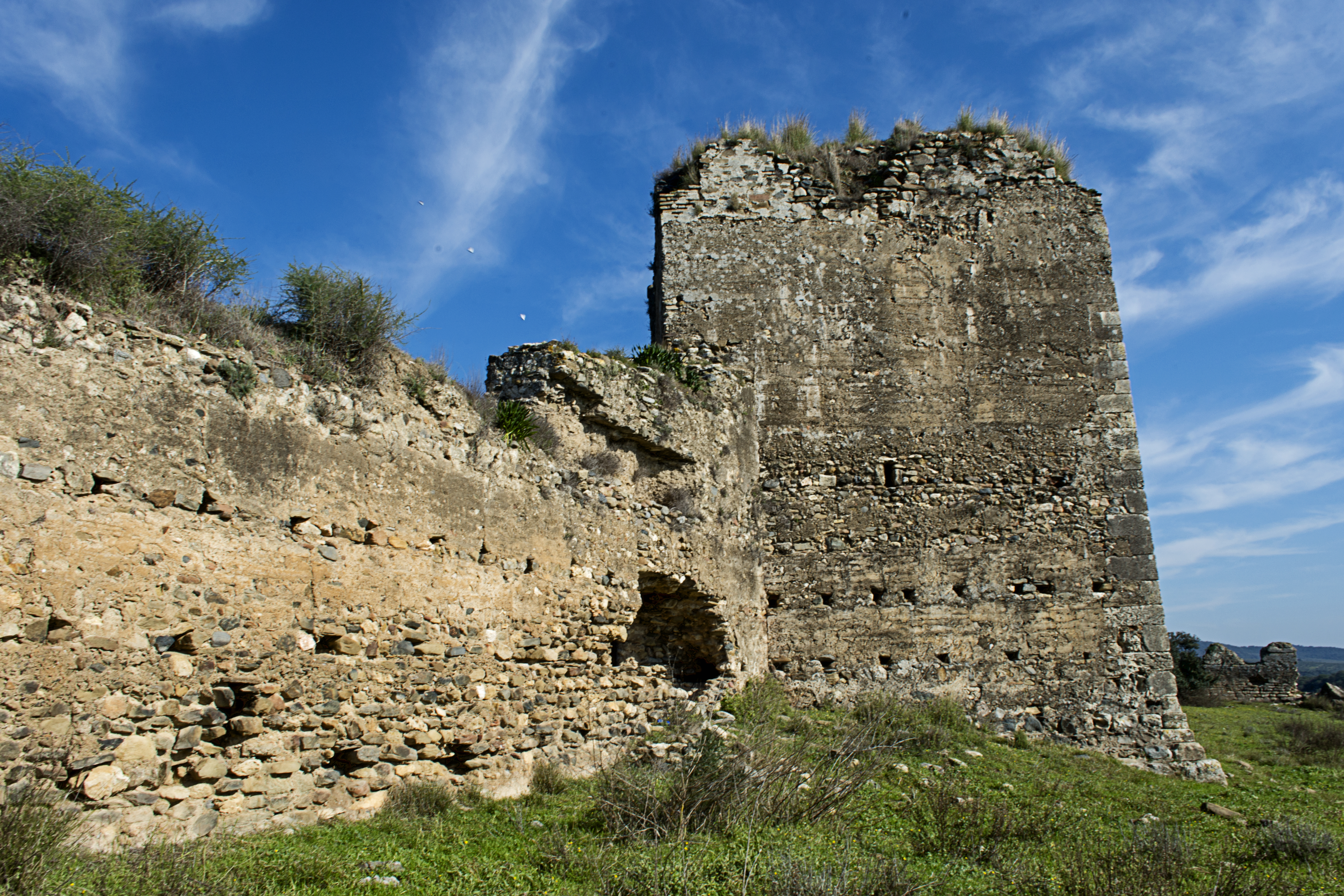 Castillo de Setefilla en el término municipal de Lora del Río. (España)